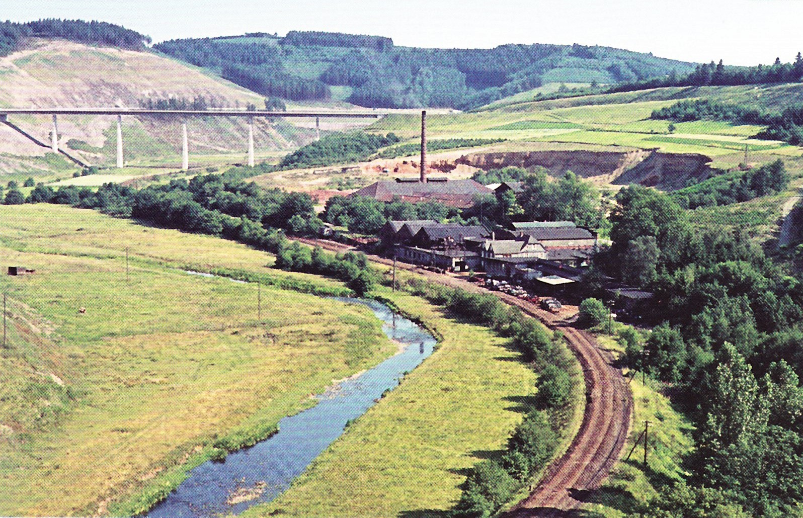 Blick auf den ehemaligen Attendorner Industriestandort Bruchwalze, der dem Bau der Biggetalsperre (1956–1965) weichen musste. Postkartenfoto um 1962. Text: „Grund und Boden dieser Industrieansiedlung gehörten ursprünglich zum Waldenburger Lehngut Imminghausen. Um 1800 wurde hier im Imminghauser Bruch ein Hammerwerk angelegt, das 1839 zum ersten Walzwerk des Kreises Olpe ausgebaut wurde und seitdem Bruchwalze hieß. Inhaber des Werkes waren bis zur Überflutung die Familien Bonzel und Muhr.“ Foto: Archiv Hans-Werner Scharloth